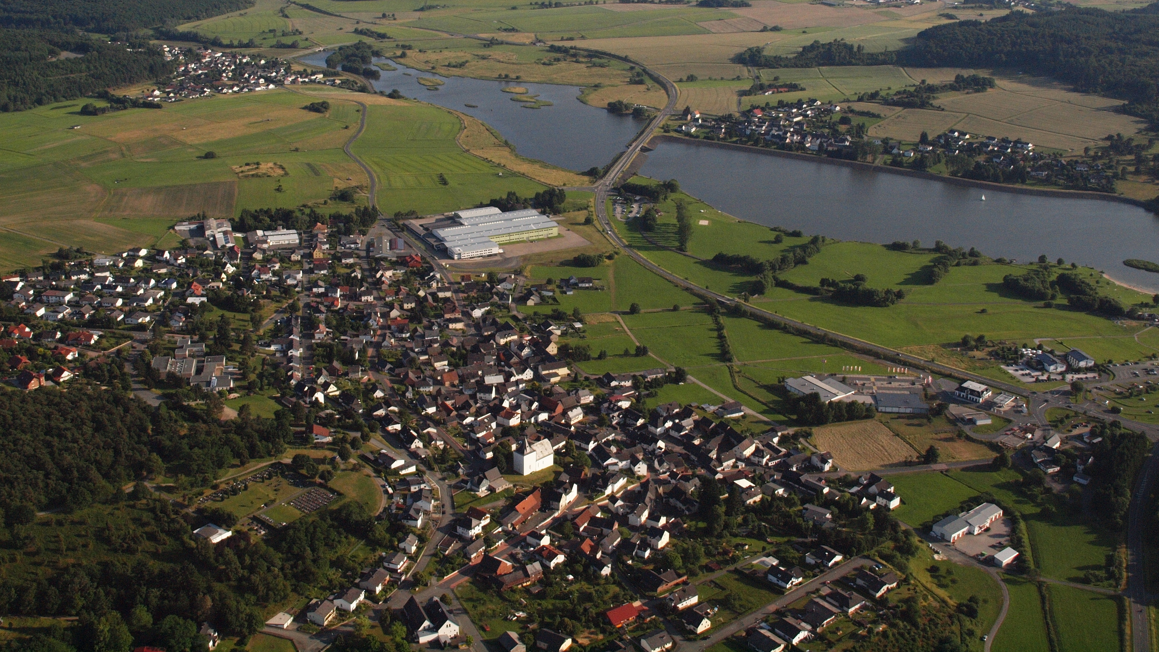 Aartalsperre: südöstlicher Teil mit der Vorsperre oben links (Naturschutzgebiet „Aartalsperre bei Mudersbach“), oben rechts Hauptbecken des Stausees; Luftaufnahme